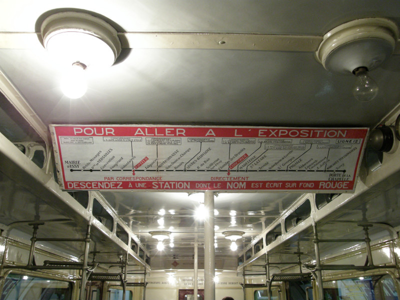 Ce plan date de 1931, étant donné qu'il fait allusion à l'Exposition Coloniale de cette année-là, indiquant les correspondances à prendre pour s'y rendre : à Concorde pour un accès direct (l'exposition ayant lieu à la Porte Dorée, desservie par la ligne 8 fraîchement prolongée) et à Pasteur avec une autre correspondance (celle-ci s'effectuant à Bastille ou bien à Place d'Italie puis à Daumesnil, puisqu'avant 1942, la ligne 6 était limitée entre Nation et Place d'Italie, le reste de l'actuelle ligne 6 étant desservi par la ligne 5).